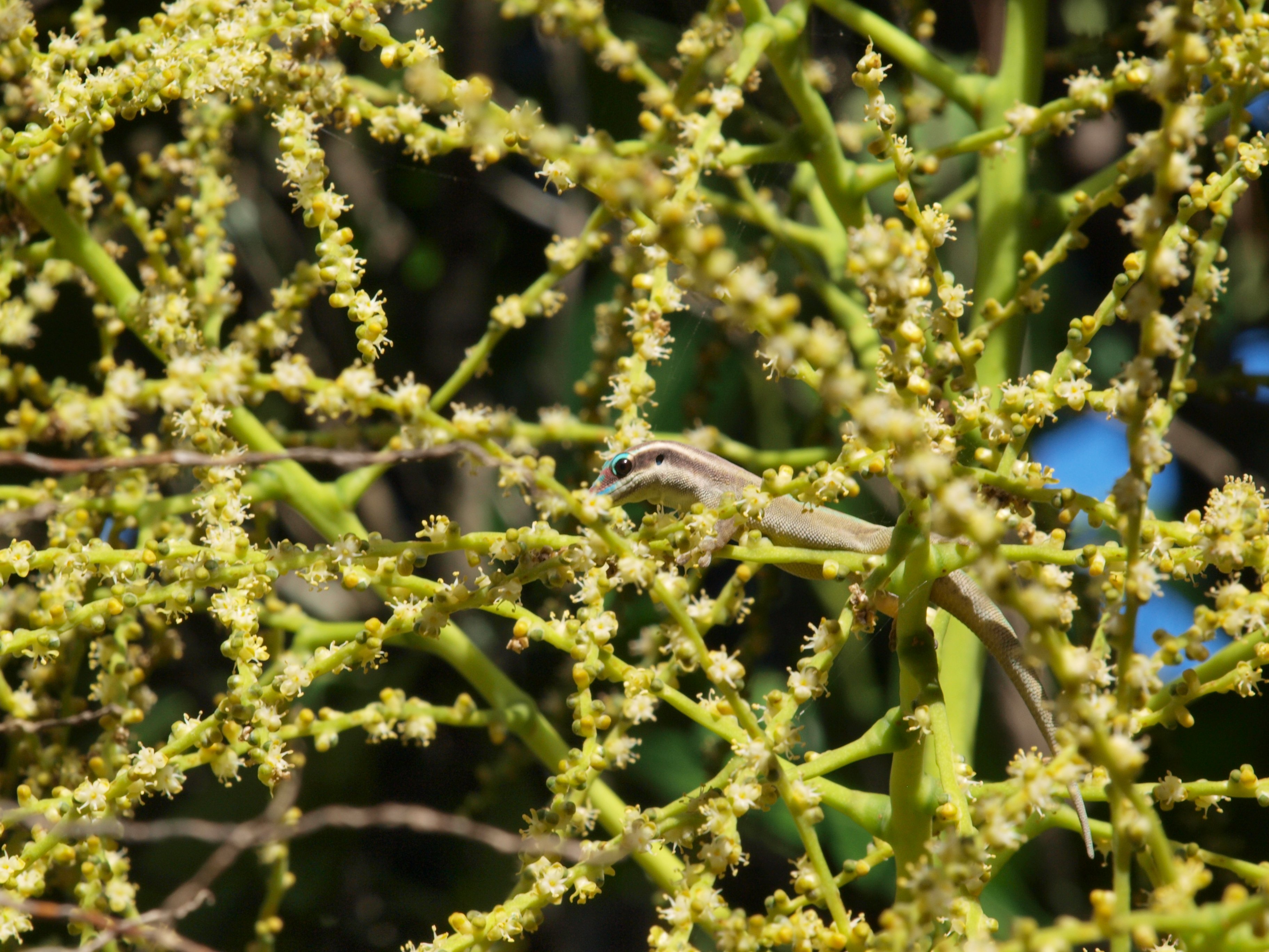 Phelsuma Ornata (Mauritius Day Gecko) visiting flowers of a bottle palm (Hyophorbe lagenicaulis), a palm that is cultured all over the tropics but is endemic to Round Island, Mauritius. Photo taken on Île aux Aigrettes, Mauritius.